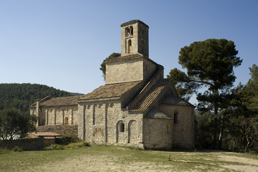 Cervelló